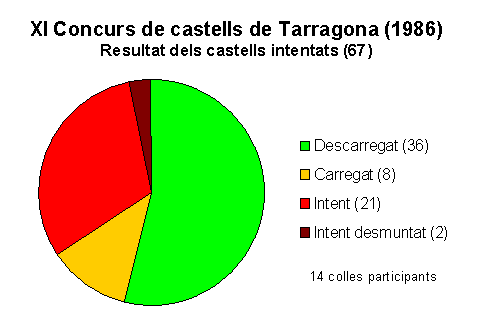 Estadística dels 67 castells intentats al XI Concurs de castells de Tarragona, celebrat el 28 de setembre de 1986 a la plaça de braus de Tarragona, actual Tarraco Arena Plaça.